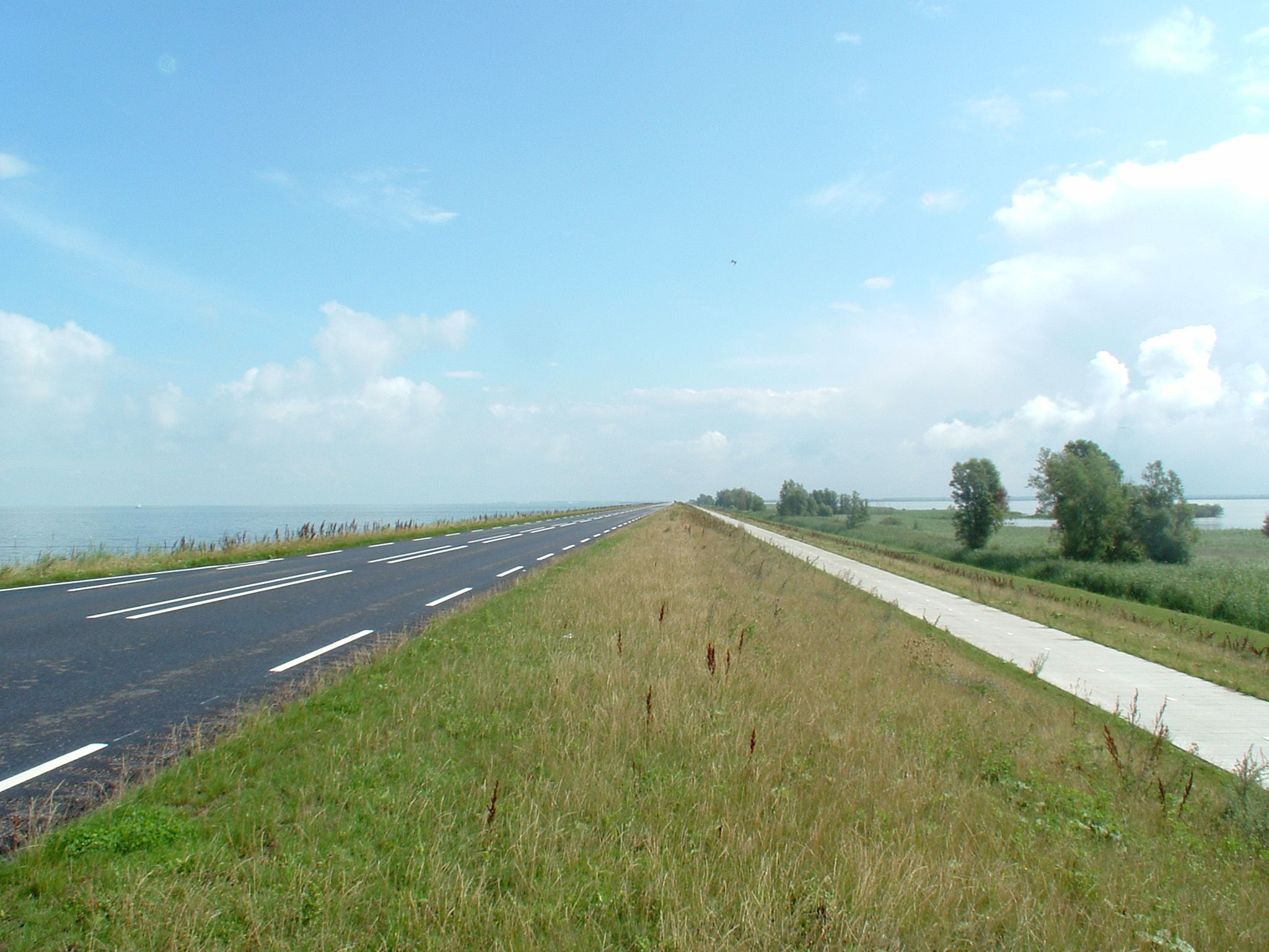 Dijk tussen Markerwaard en Zuidelijke Flevopolder t.h.v. Oostvaardersplassen